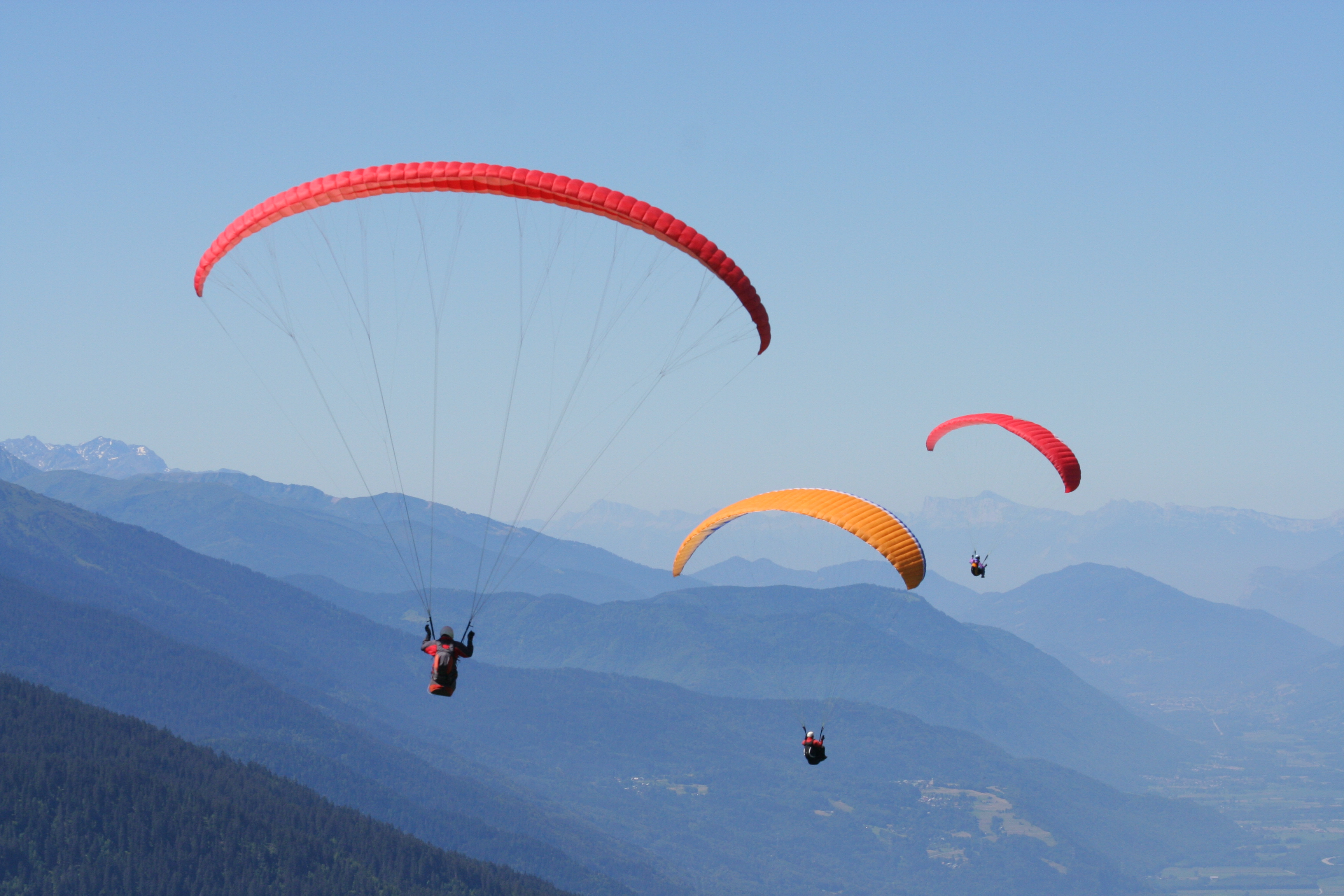 Parapentes au départ du signal du Bisanne (1941 m). L'école de parapente Les Volatiles des Saisies, triple championne de France, propose des baptêmes de l'air de 1000 à 1200m de dénivelé.